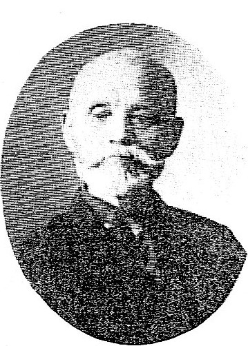 陸軍主計監であった日匹信亮